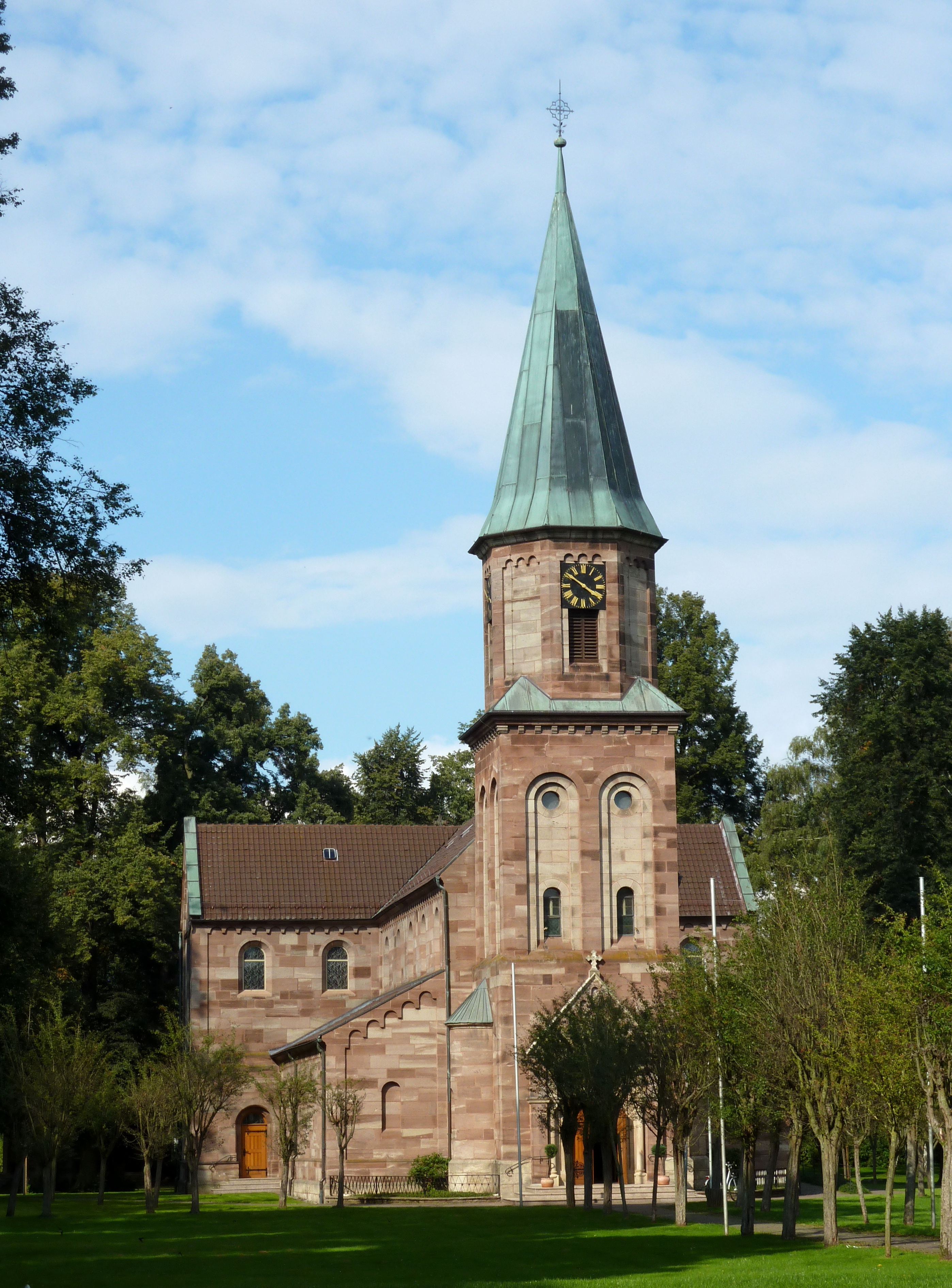 Neoromanische, römisch-katholische Wallfahrtskirche Mariä Verkündigung in Germershausen, Gemeinde Rollshausen, Untereichsfeld, Südniedersachsen. Erbaut 1887–1889 nach Planung von Anton Paasch aus Hildesheim.